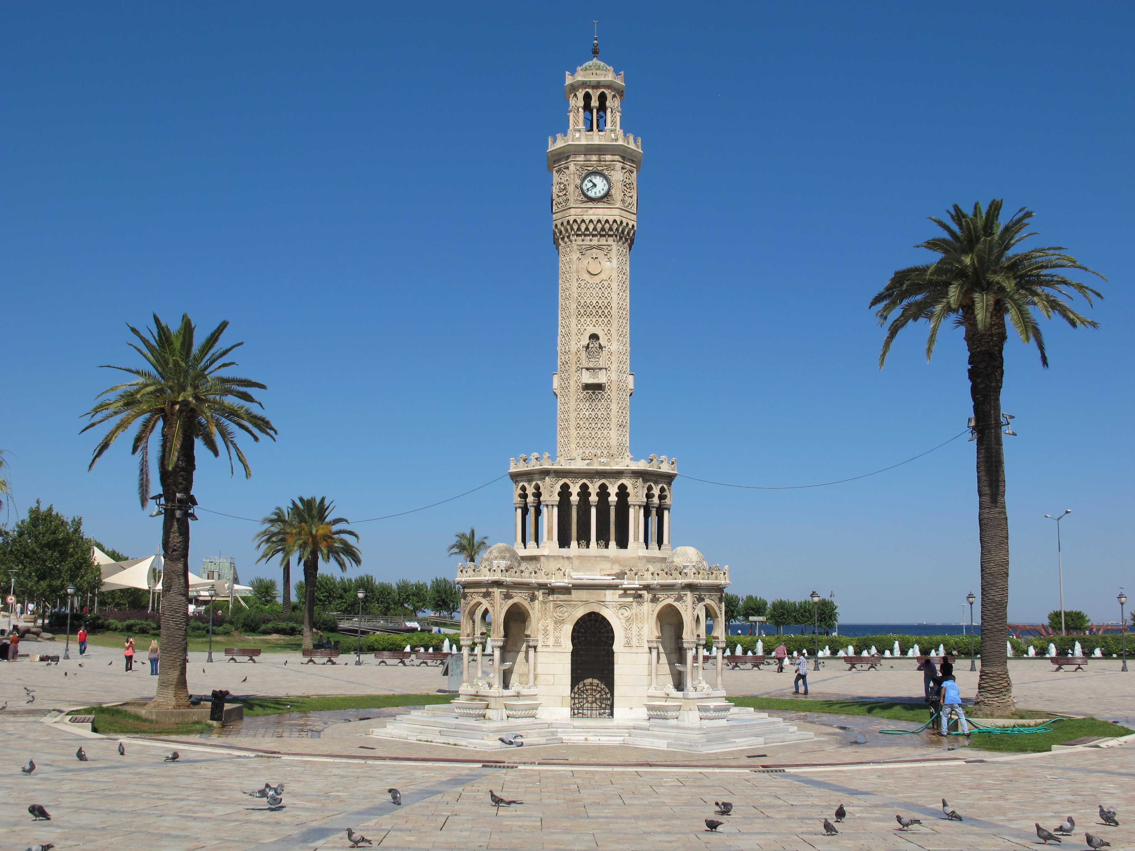 Izmir, torre dell'orologio